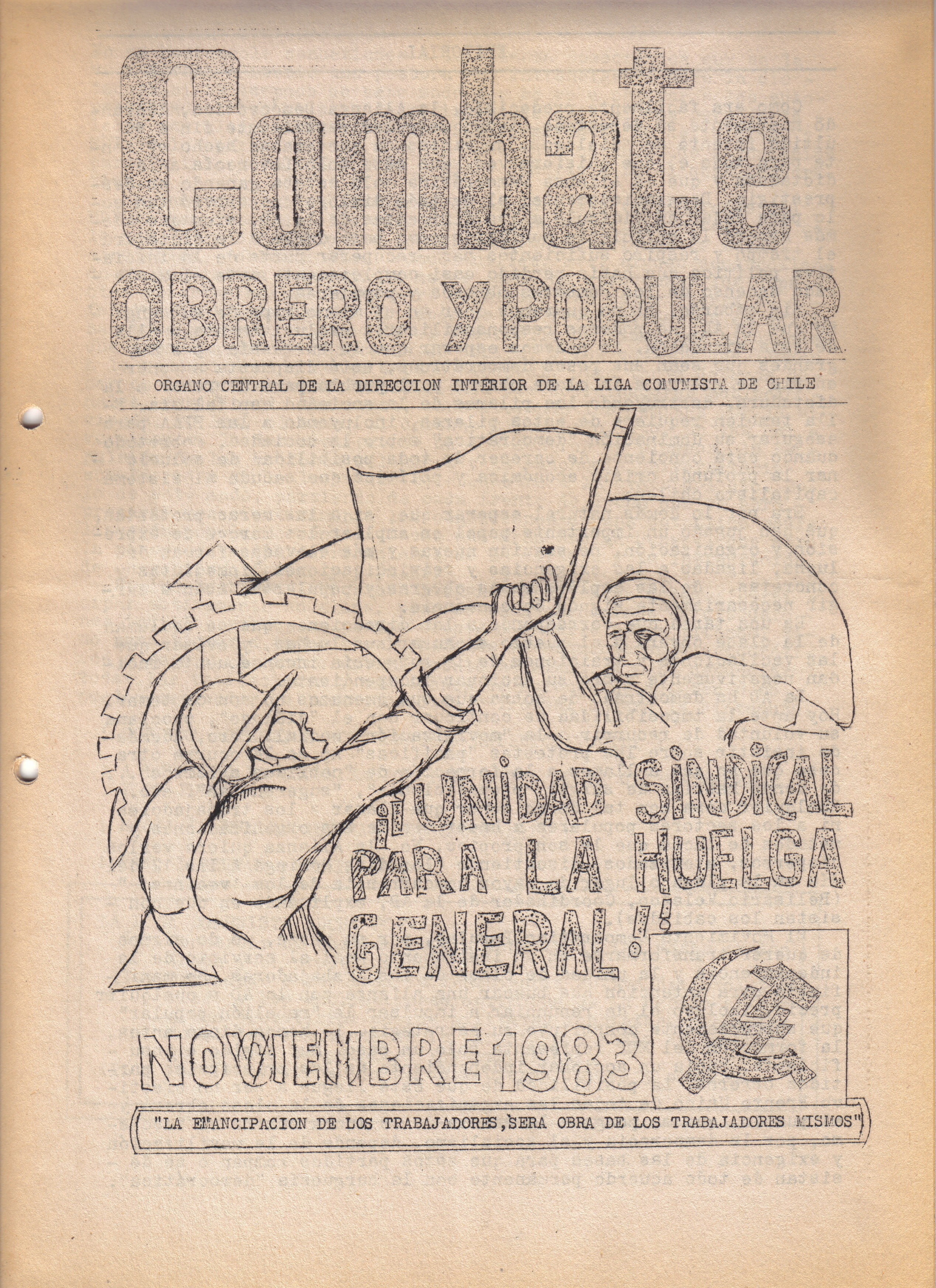 COP de Noviembre de 1983